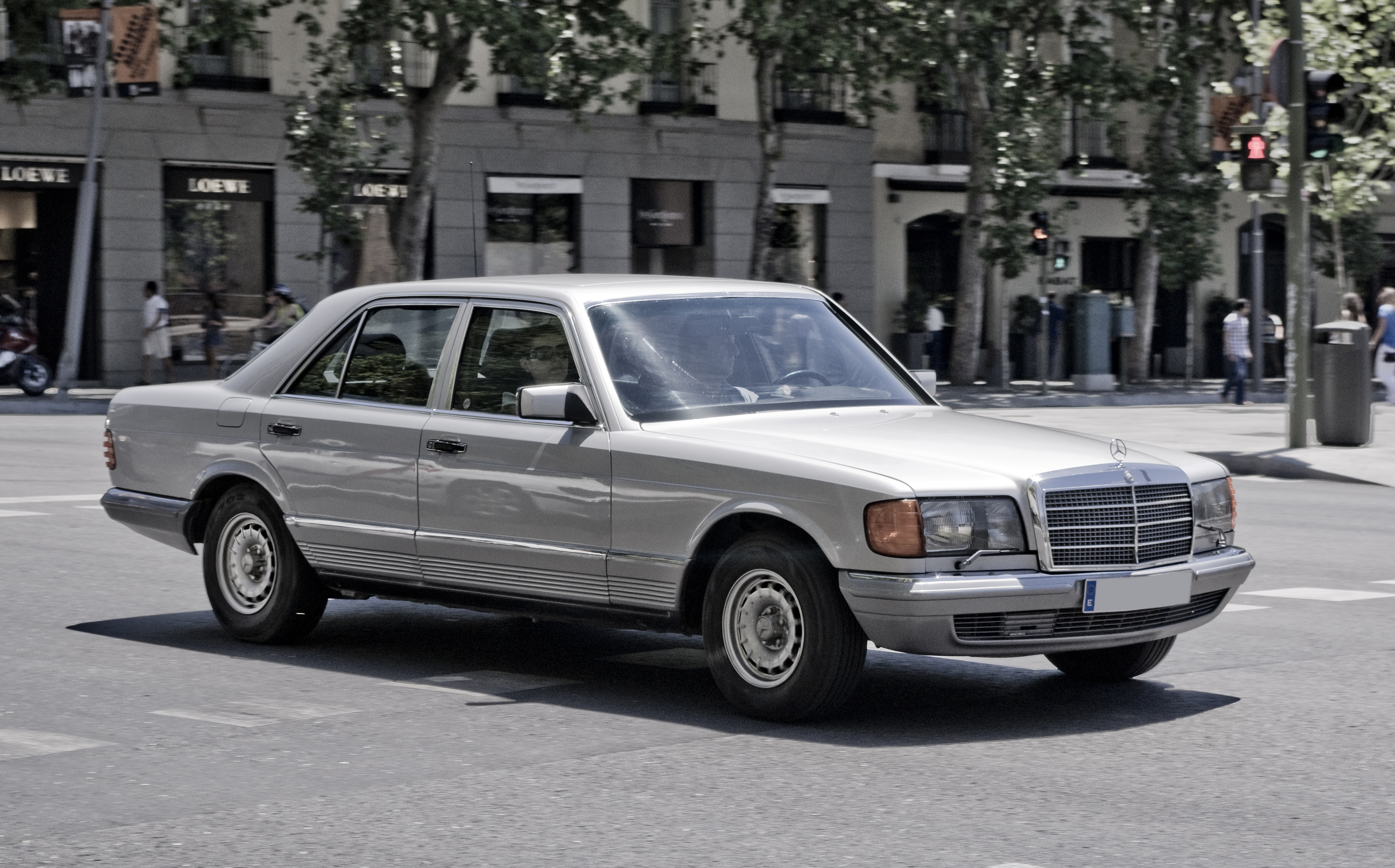 Mercedes-Benz 380 SE [W126]